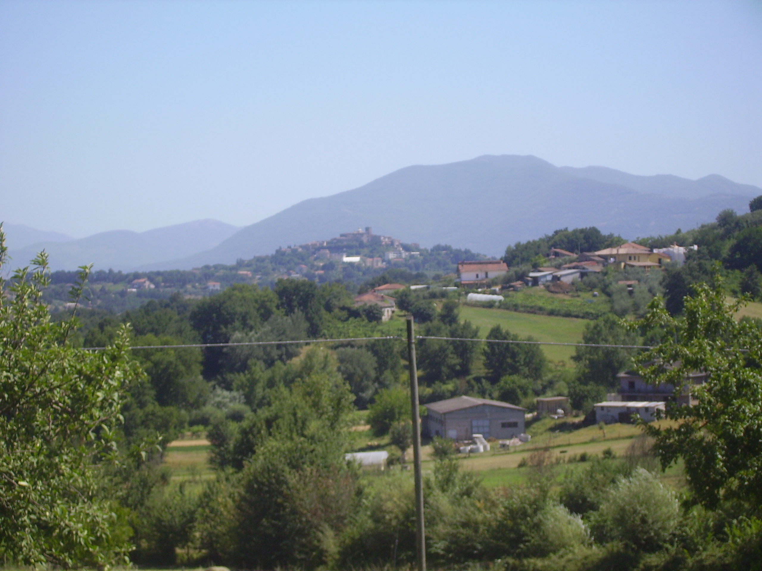 Montagne da Ripi